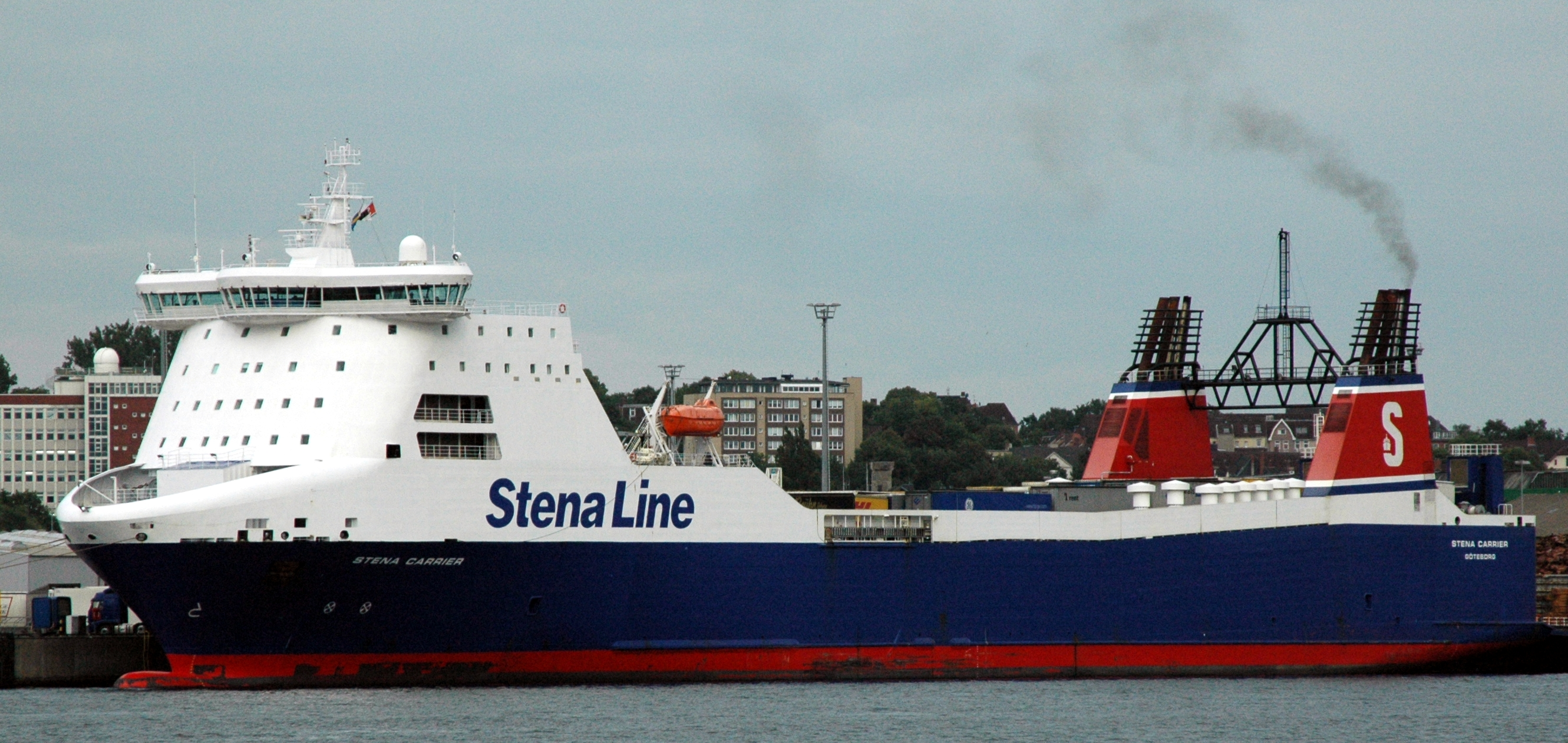 StenaCarrier in Kiel